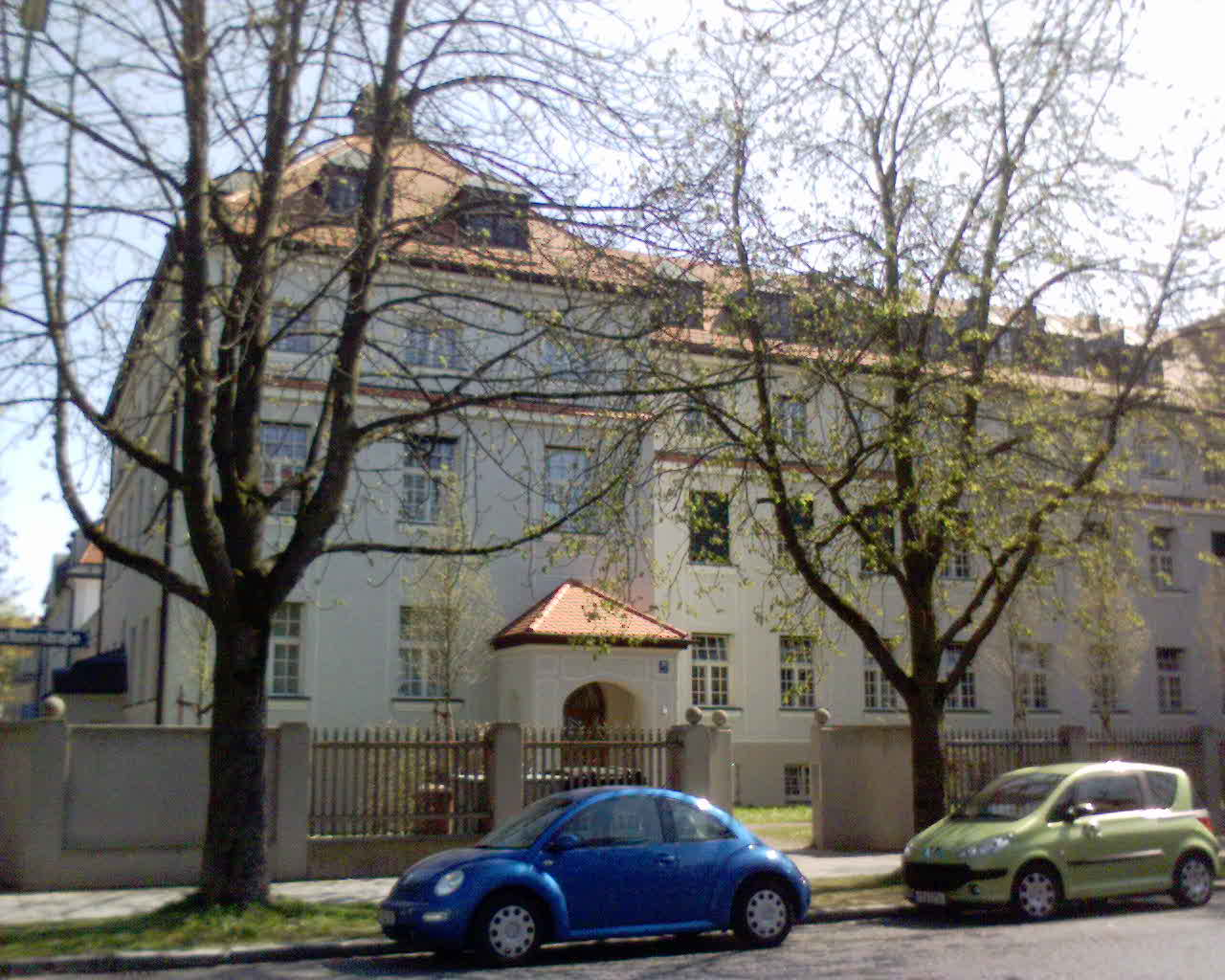 Ehemalige Klinik in der Lachnerstrasse.